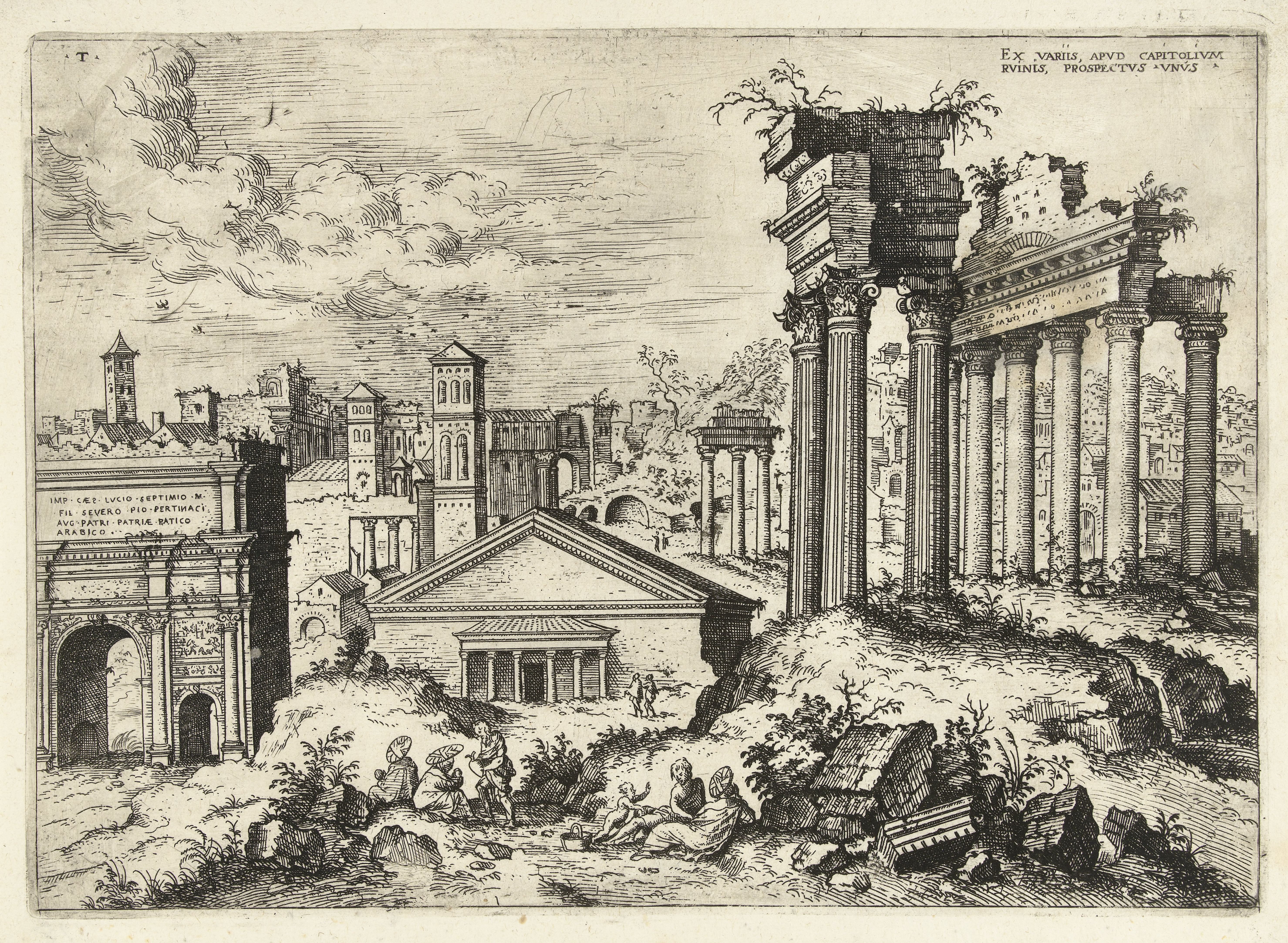 IdentificatieTitel(s): Gezicht op het Forum Romanum vanuit het CapitoolEx variis, apvd capitolvm rvinis (...) (titel op object)Romeinse ruïnes (serietitel)Objecttype: prent Objectnummer: RP-P-1882-A-6456Catalogusreferentie: Riggs 21Hollstein Dutch 42Opschriften / Merken: verzamelaarsmerk, verso, gestempeld: Lugt 2228Omschrijving: Gezicht op de ruïnes van het Forum Romanum vanuit het Capitool gezien. Tussen de ruïnes zitten mensen te eten en te rusten. Prent uit een serie van 25 prenten met Romeinse ruïnes.VervaardigingVervaardiger: prentmaker: Hieronymus Cocknaar eigen ontwerp van: Hieronymus Cockuitgever: Hieronymus CockPlaats vervaardiging: AntwerpenDatering: 1551Fysieke kenmerken: etsMateriaal: papier Techniek: etsenAfmetingen: plaatrand: h 233 mm × b 327 mmOnderwerpWat: ruin of a building ~ architectureWaar: Forum RomanumCapitoolVerwerving en rechtenVerwerving: aankoop nov-1882Copyright: Publiek domein